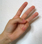 Chinesische Zahl Drei